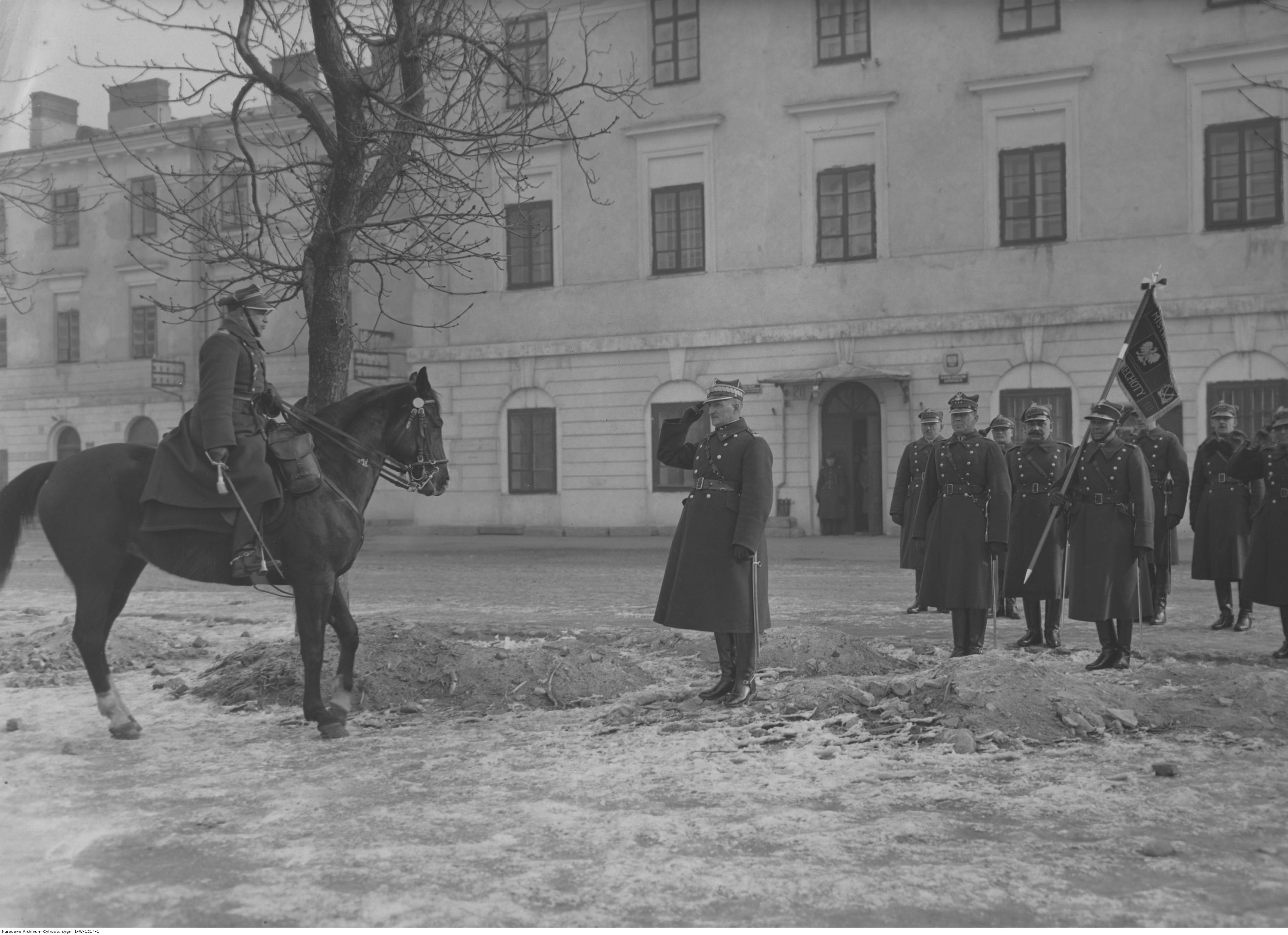 Wręczenie proporca 8 kompanii 30 Pułku Strzelców Kaniowskich za zdobycie I miejsca w zawodach strzeleckich 10 Dywizji Piechoty. Gen. bryg. Józef Olszyna-Wilczyński (w środku) przyjmuje raport od płk. Mieczysława Pereświet-Sołtana (na koniu). Koncern Ilustrowany Kurier Codzienny - Archiwum Ilustracji. Sygnatura: 1-W-1214-1